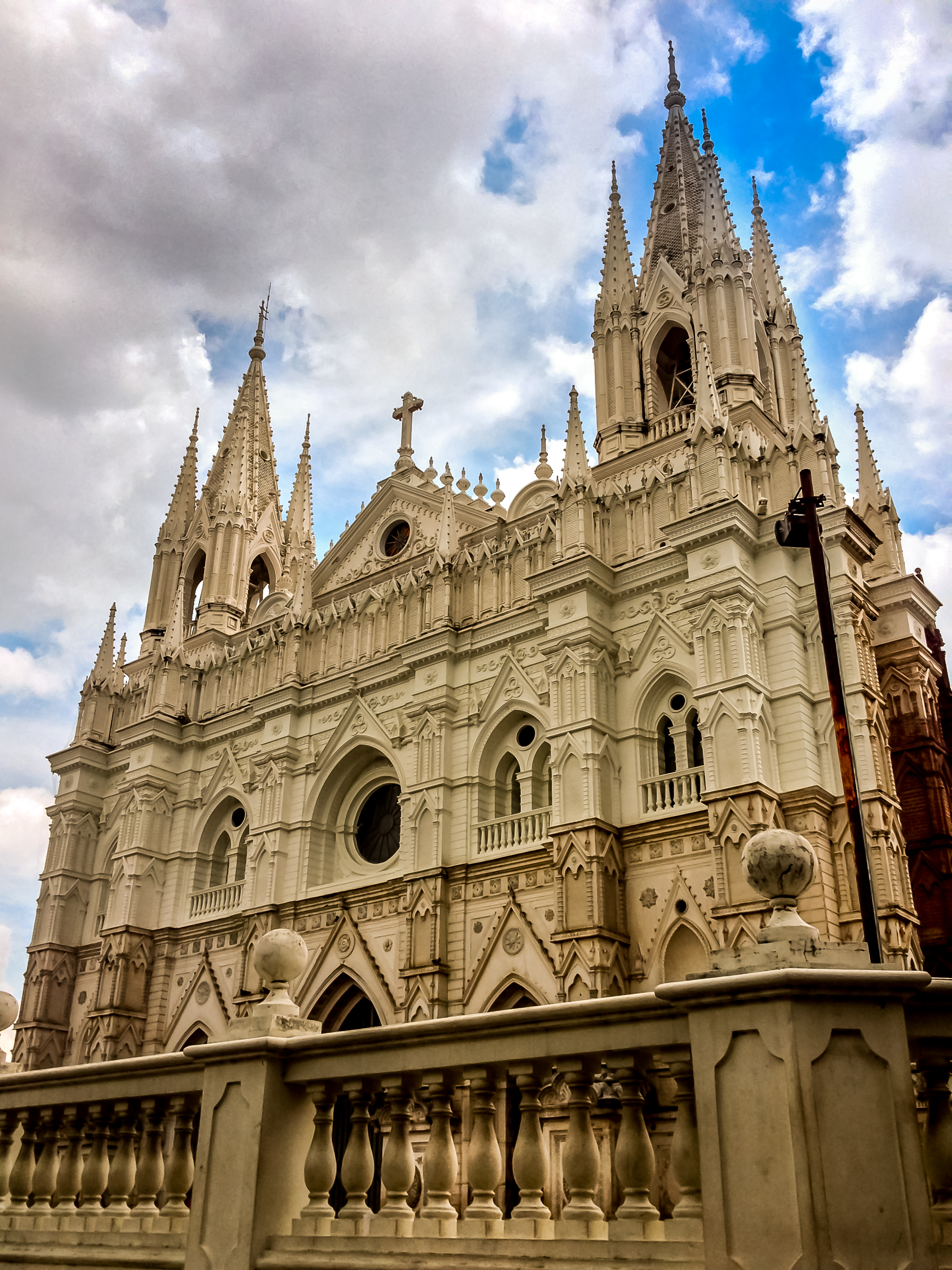 Catedral Nuestra Señora de Santa Ana